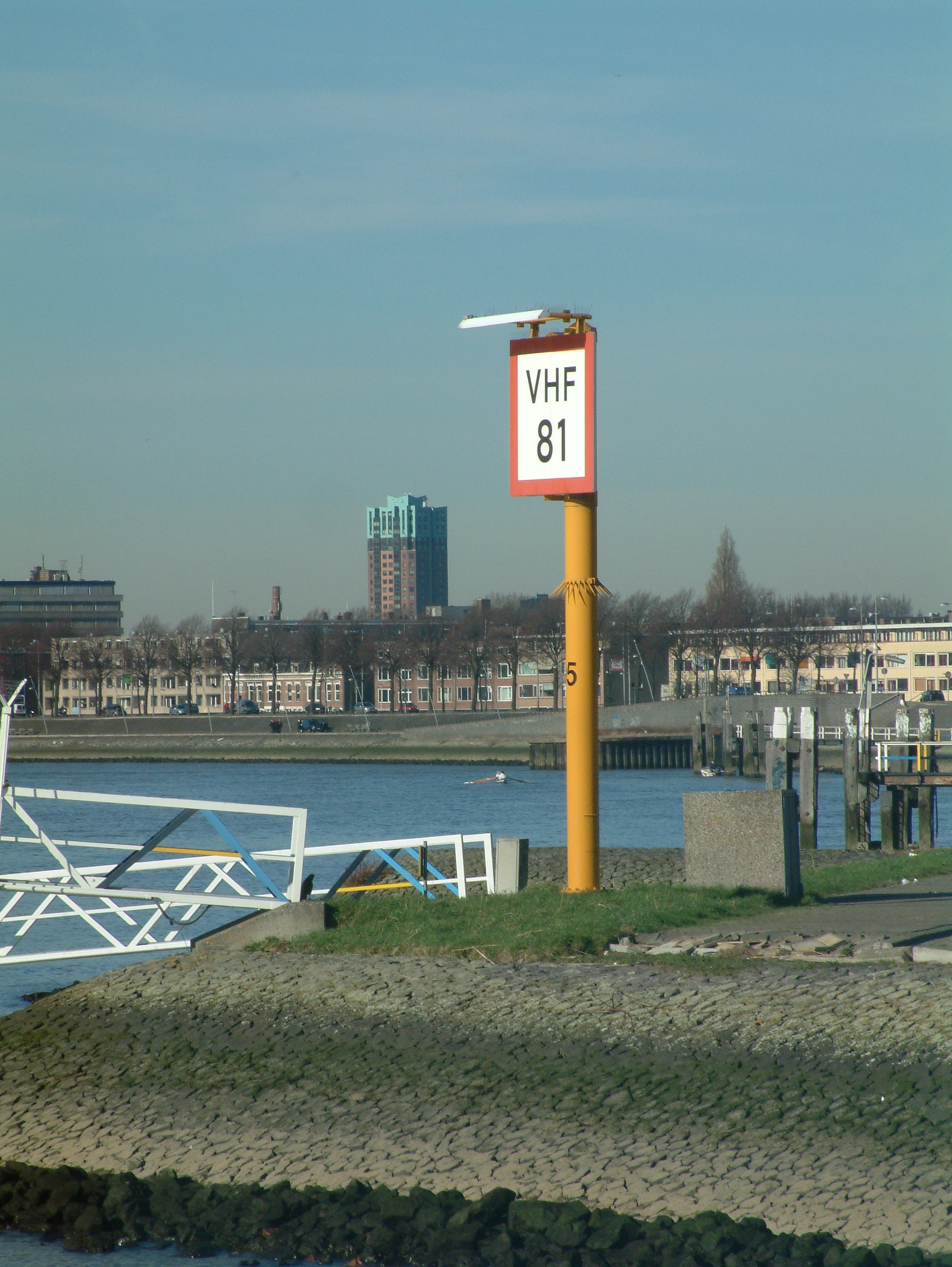 Aanduiding marifoon blokkanaal